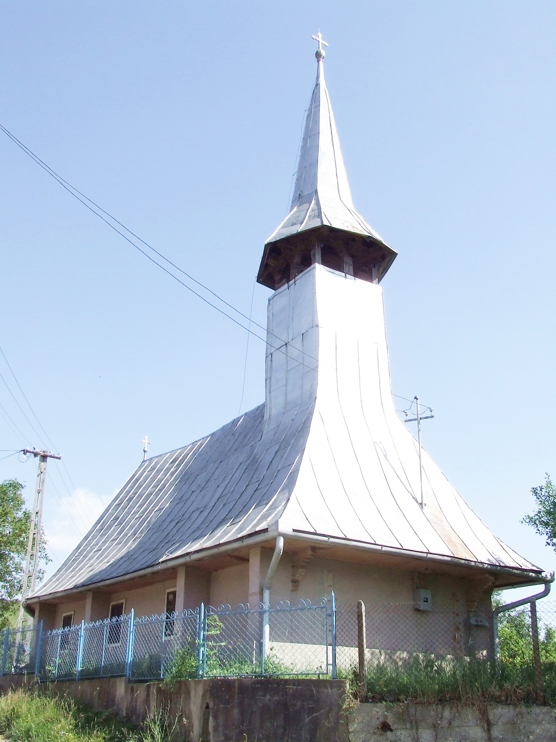 Biserica de lemn din Husia, judeţul Sălaj. Autor: Bogdan Ilieş Data: iunie 2007